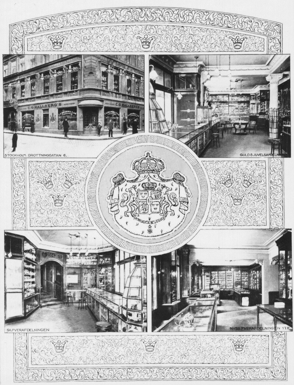 Fredsgatan - Drottninggatan, reklamblad för Hallbergs guldsmedsaffär